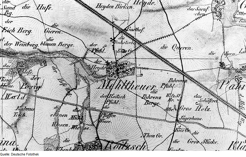 Original image description from the Deutsche Fotothek Hirschstein-Mehltheuer. Oberreit, Sect. Oschatz, 1839/40